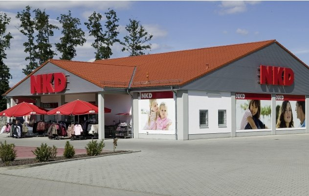 NKD Bad Soden-Salmünster